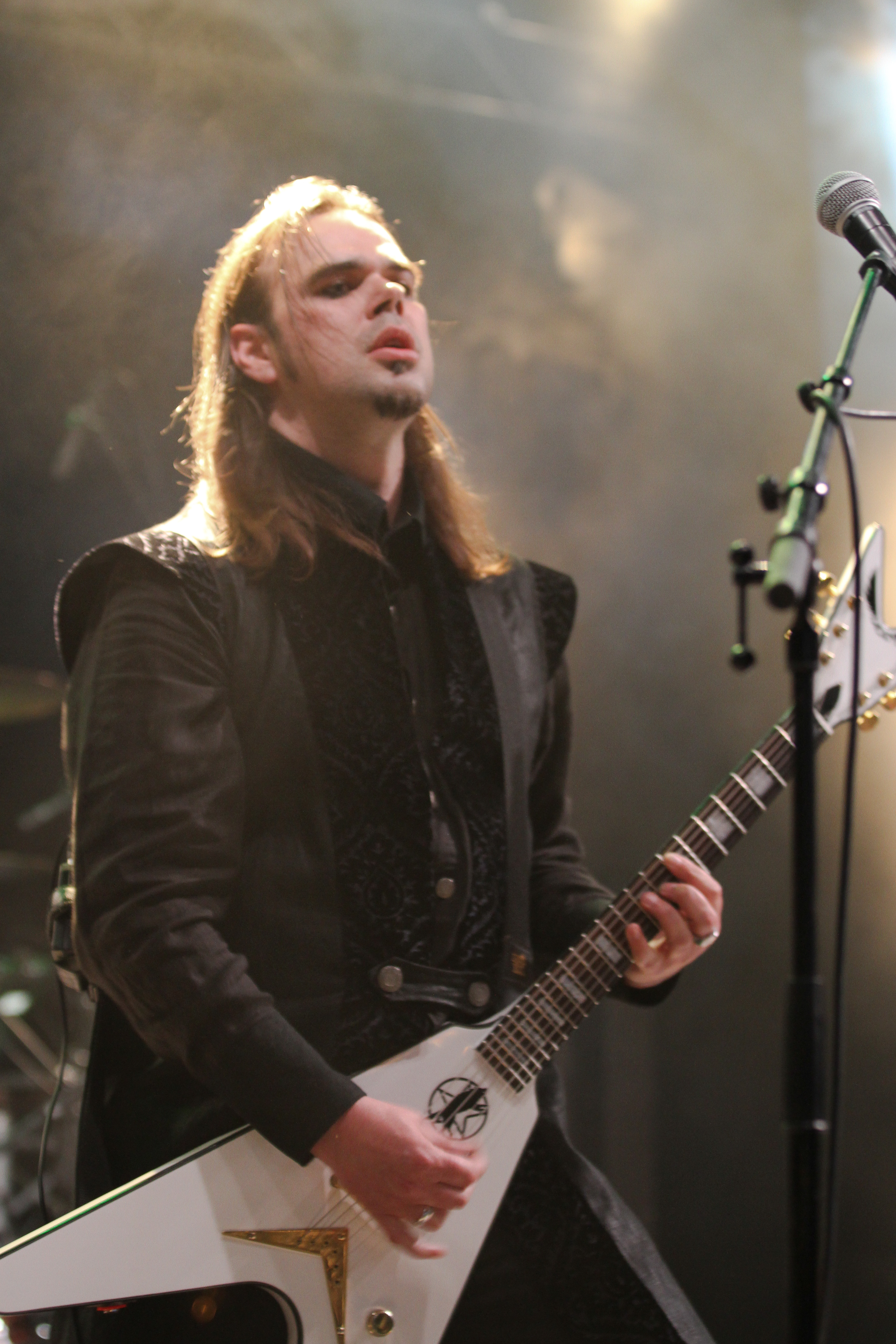 The Vision Bleak auf dem Wave-Gotik-Treffen 2013 in Leipzig, Kohlrabizirkus.